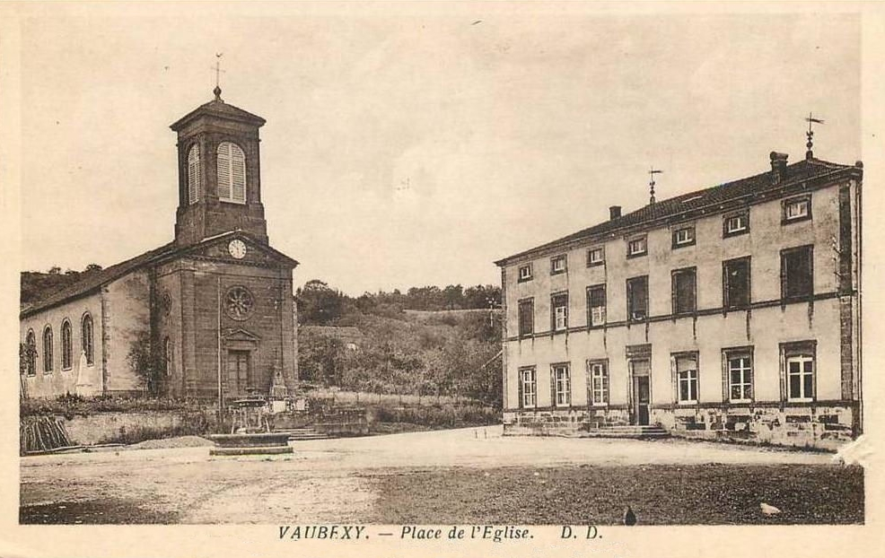 La place de l'église vers 1920.